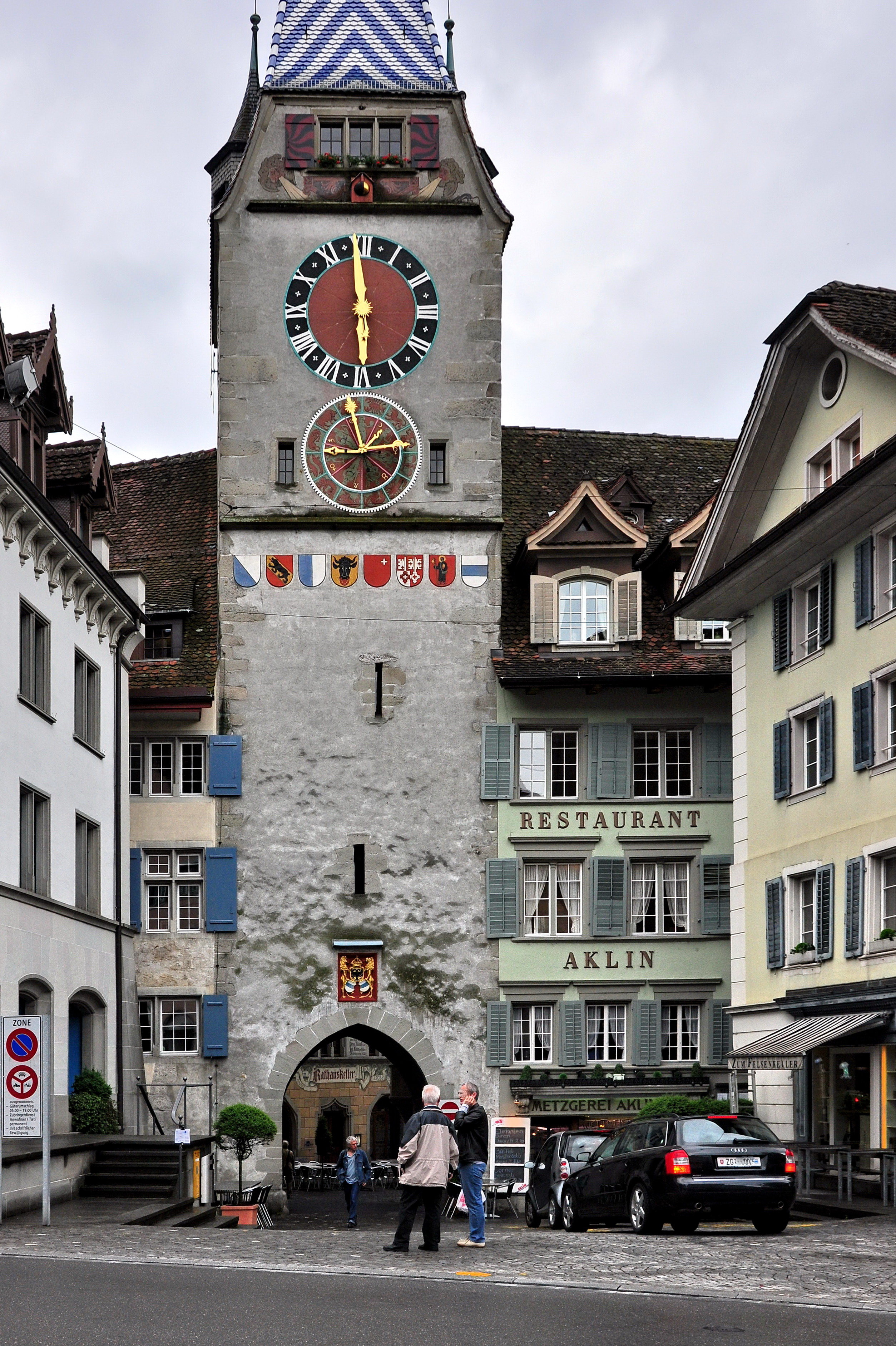 Zytturm in Zug (Switzerland)